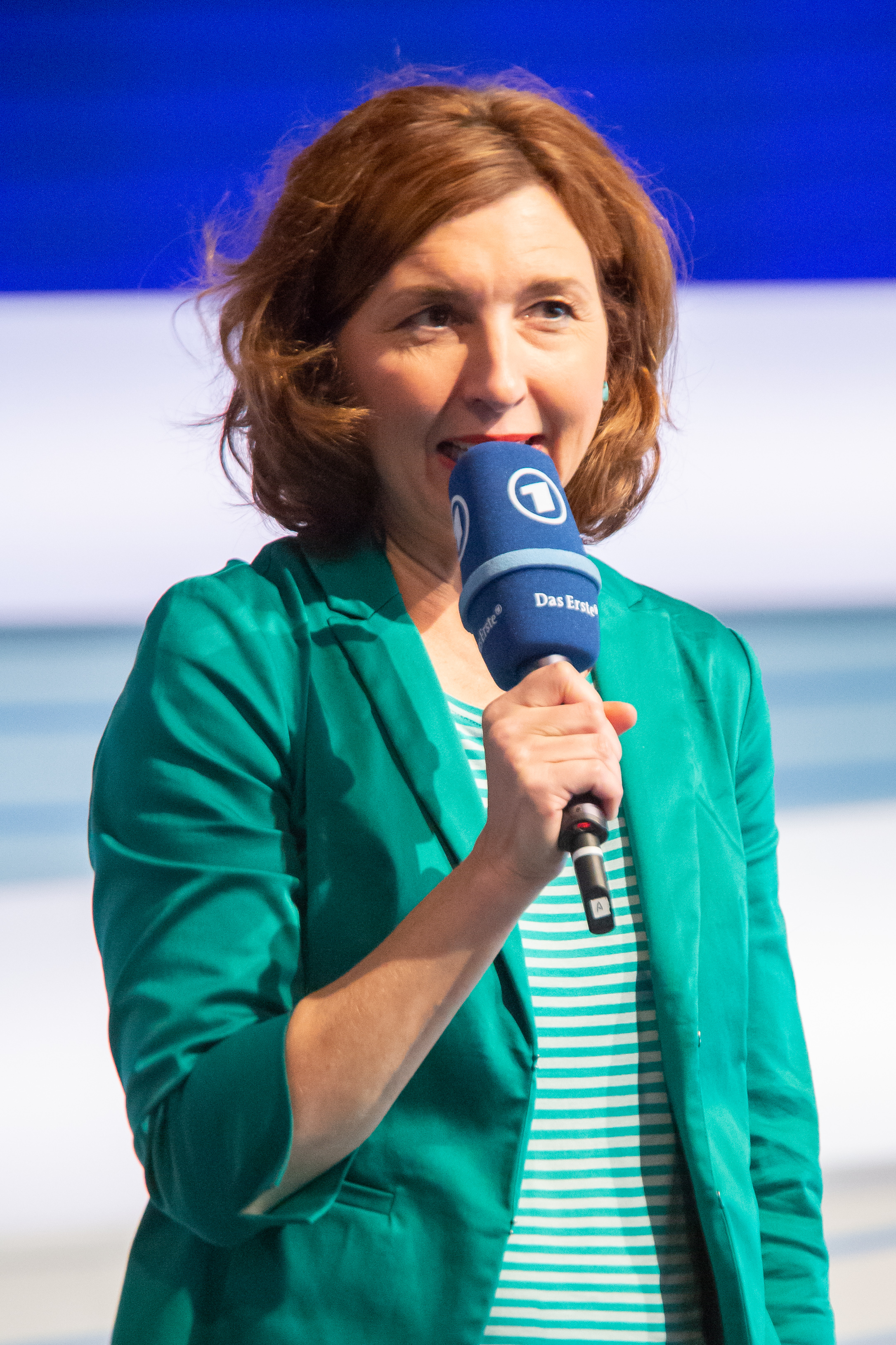 Buchpreisträgerin Inger-Maria Mahlke im Gespräch mit Cécile Schortmann auf der ARD-Bühne der Frankfurter Buchmesse 2018